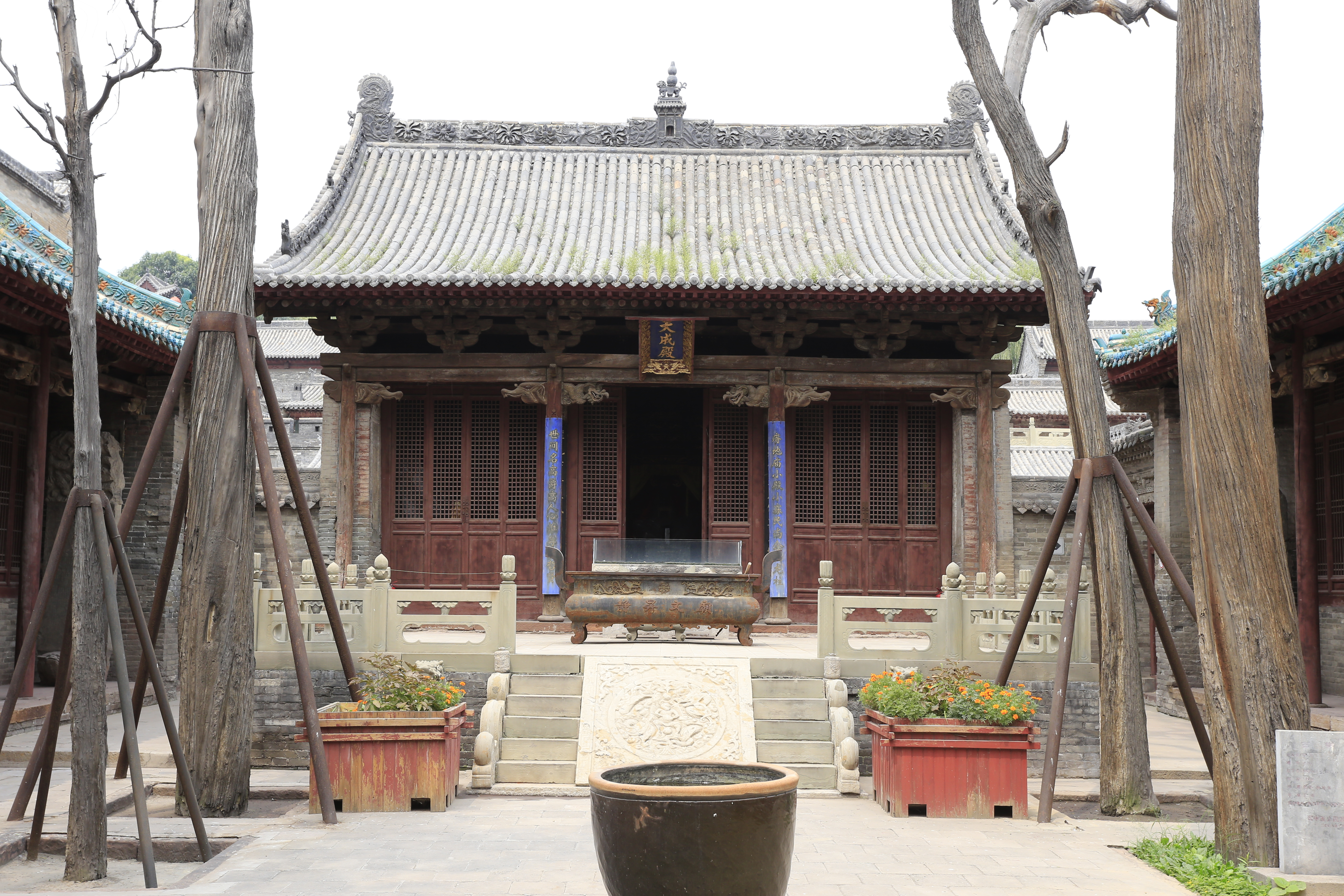 灵石静升文庙 —— 大成殿